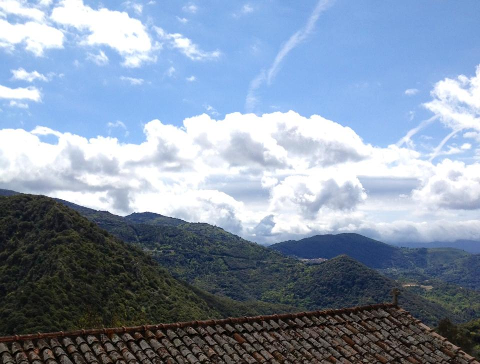 Cargiaca